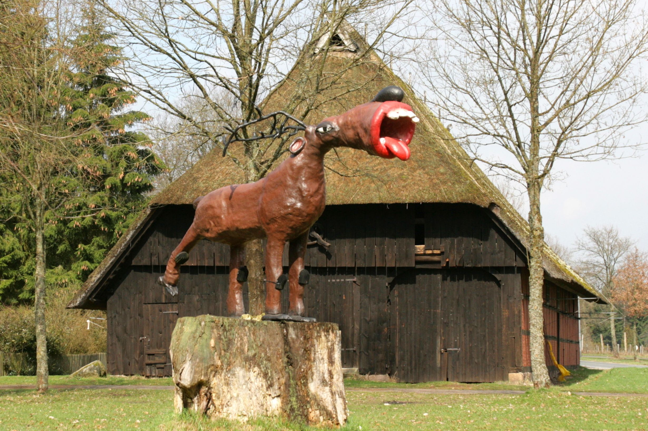 Synthetischer Hirsch an der Ecke Breitenheeser Straße (B191) / Unterlüßer Straße in Eschede-Weyhausen